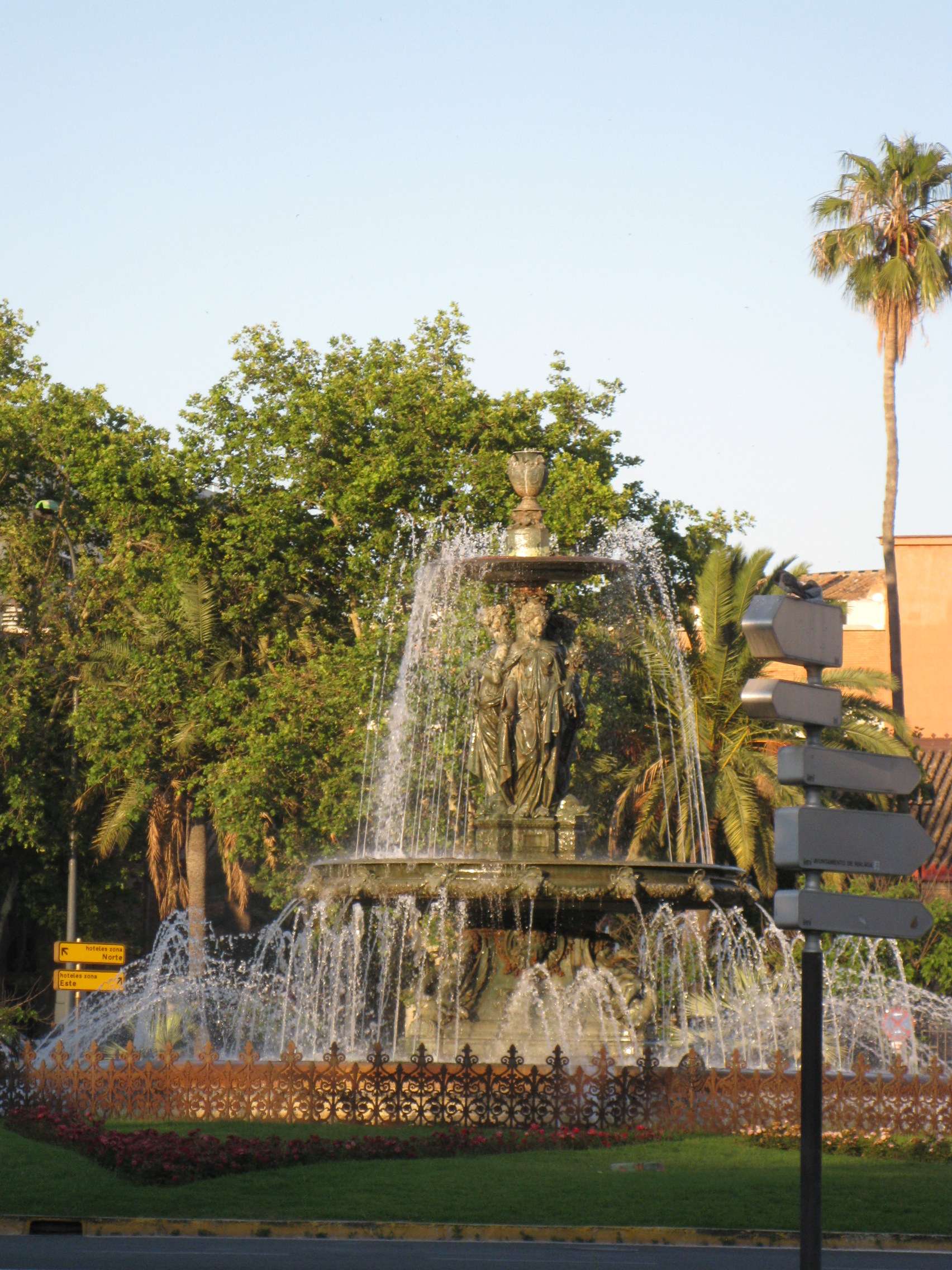 Fuente de las tres gracias, en la plaza de Torrijos, Málaga, España.